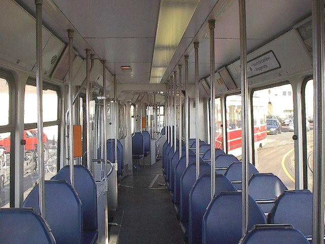 Interieur van een GTL8-II-tram